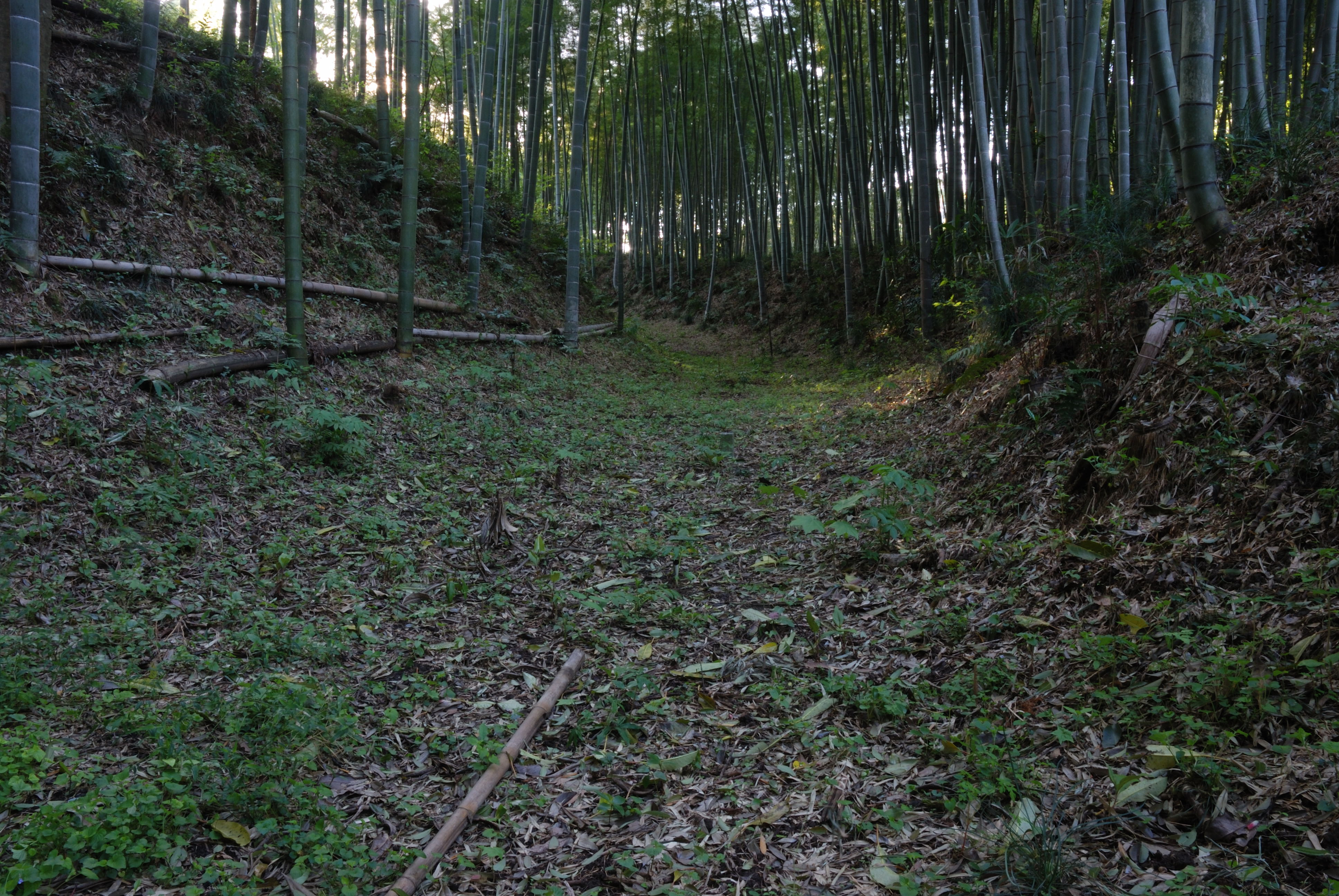 Jochucho karabori